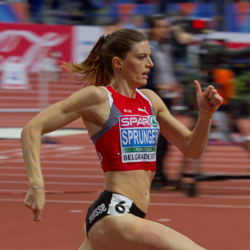 167 finale 400m sprunger